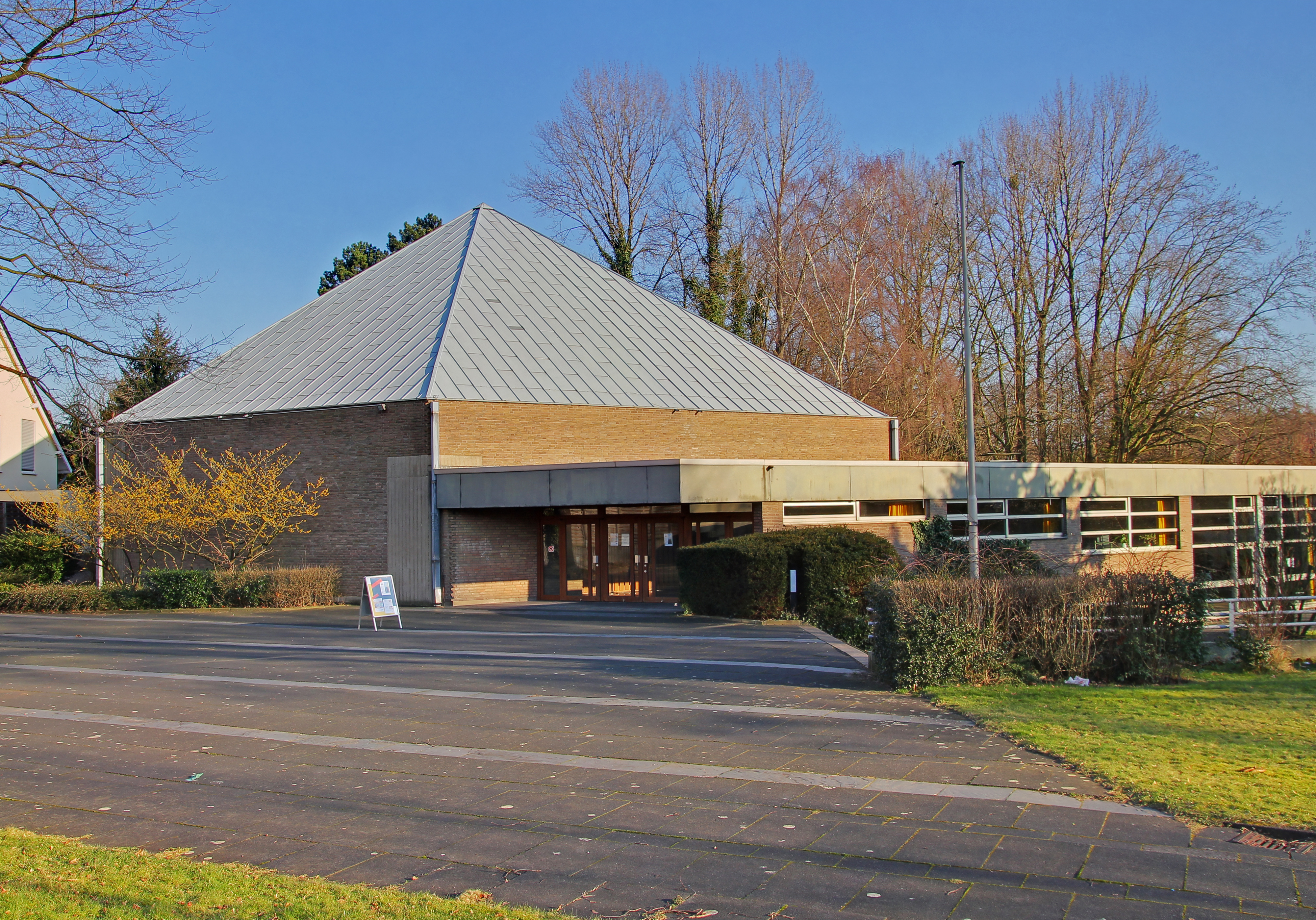 Friedenskirche in Leverkusen-Schlebusch (Waldsiedlung), Belichtungsfusion aus 3er-Reihe mit PTGui Pro